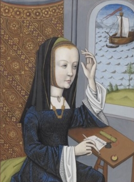 Laodamie écrivant. Miniature extraite des Héroïdes d'Ovide, traduction d'Octavien de Saint-Gelais.